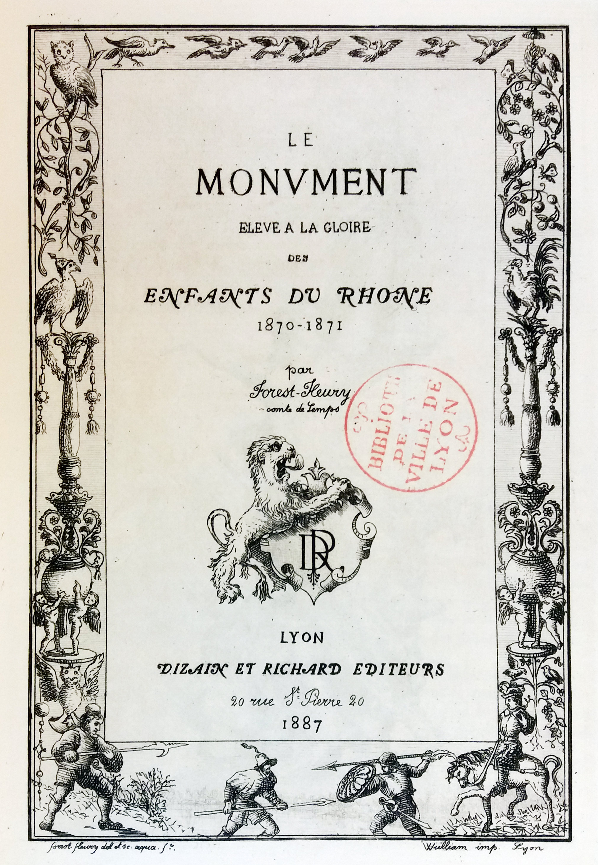 Couverture du livre de Forest-Fleury : Le Monument élevé à la gloire des enfants du Rhône : 1870-1871 (1887).